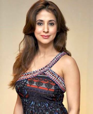 Urmila Matondkar at Anita Dongre's store launch